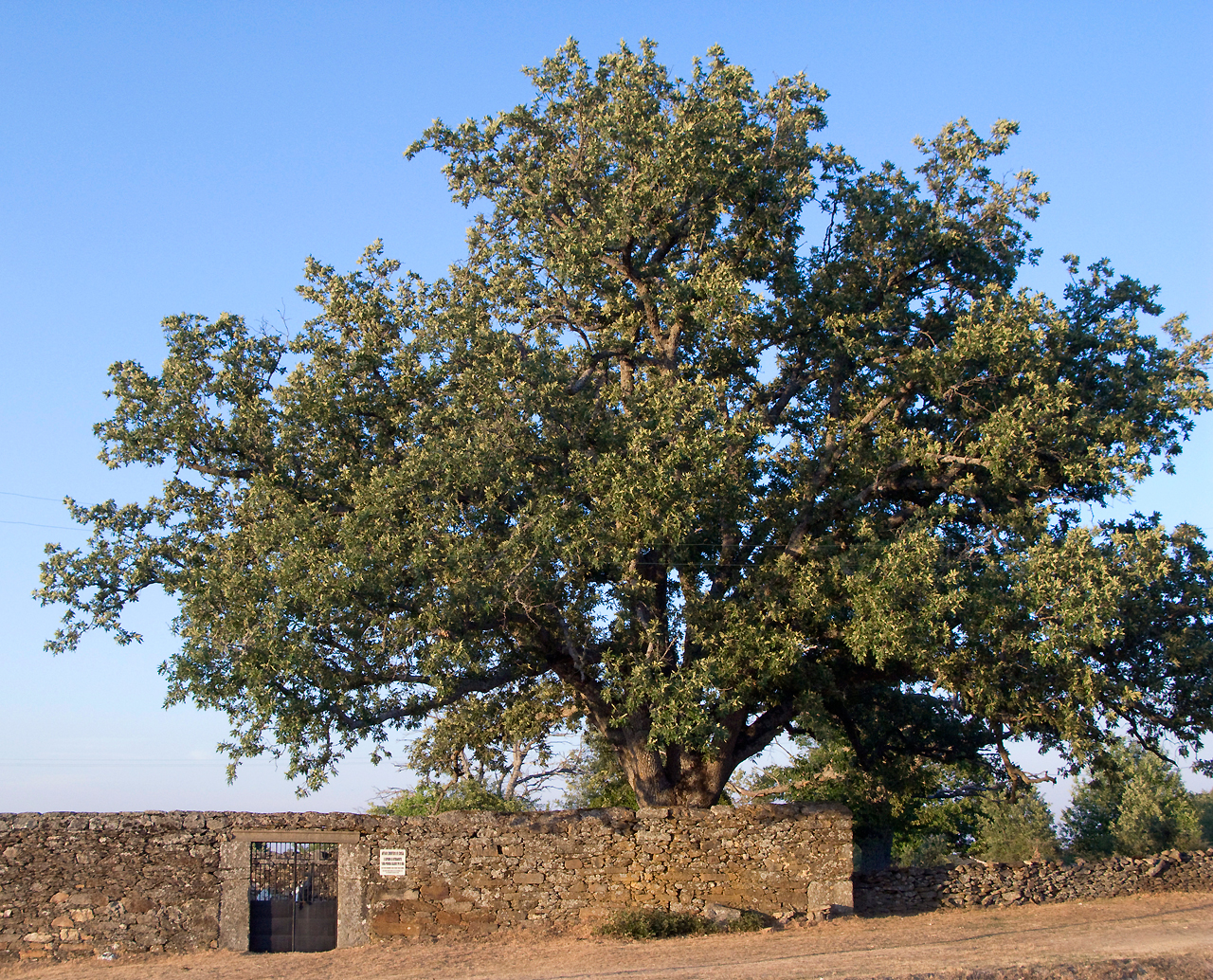 Roble del cementrio viejo de Codesal en Zamora (Castilla y León, España). Este roble singular es el emblema del esta localidad.